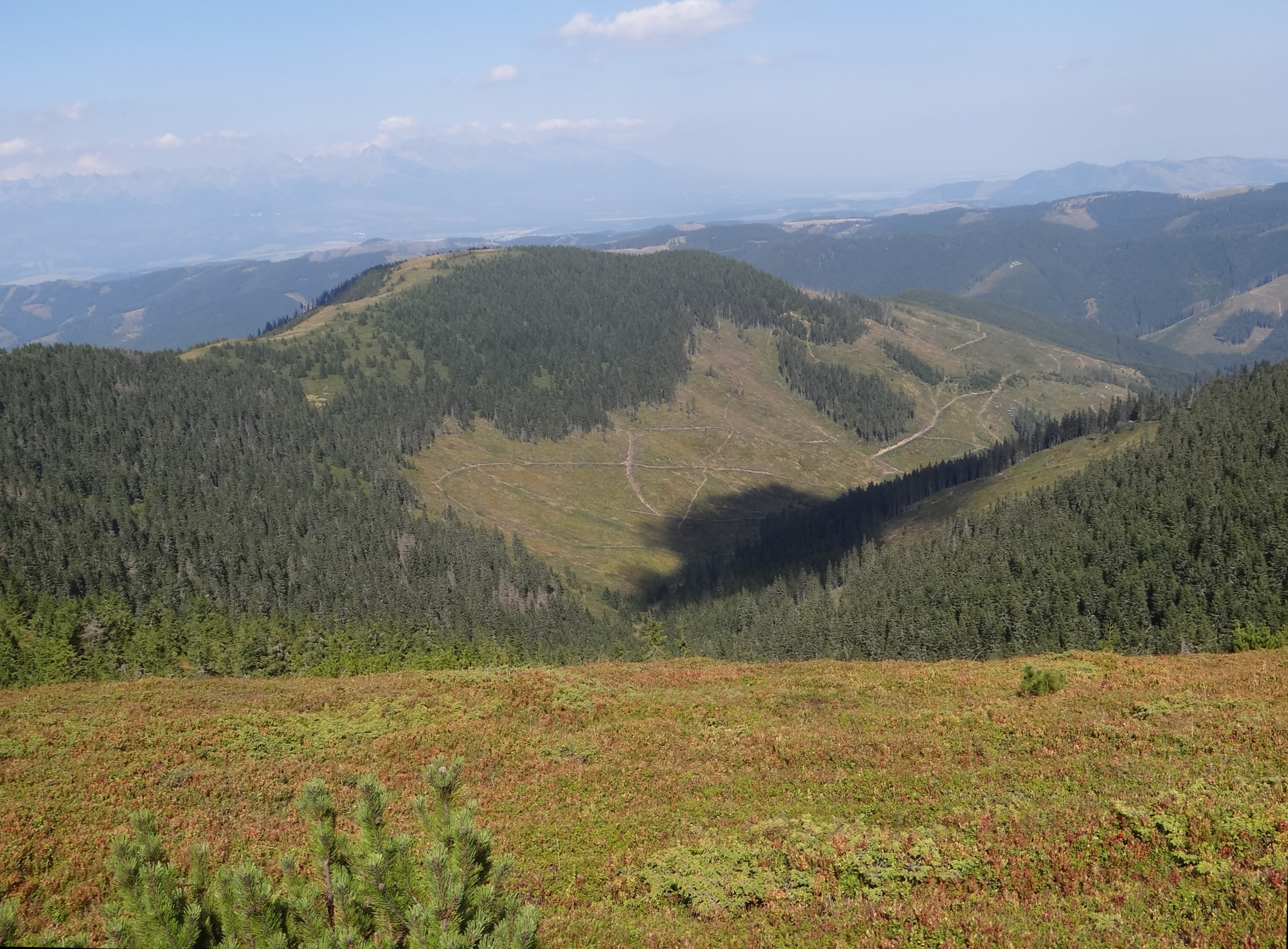 Medvedia i dolina Ipoltica Widok ze szczytu Veľká Vápenica